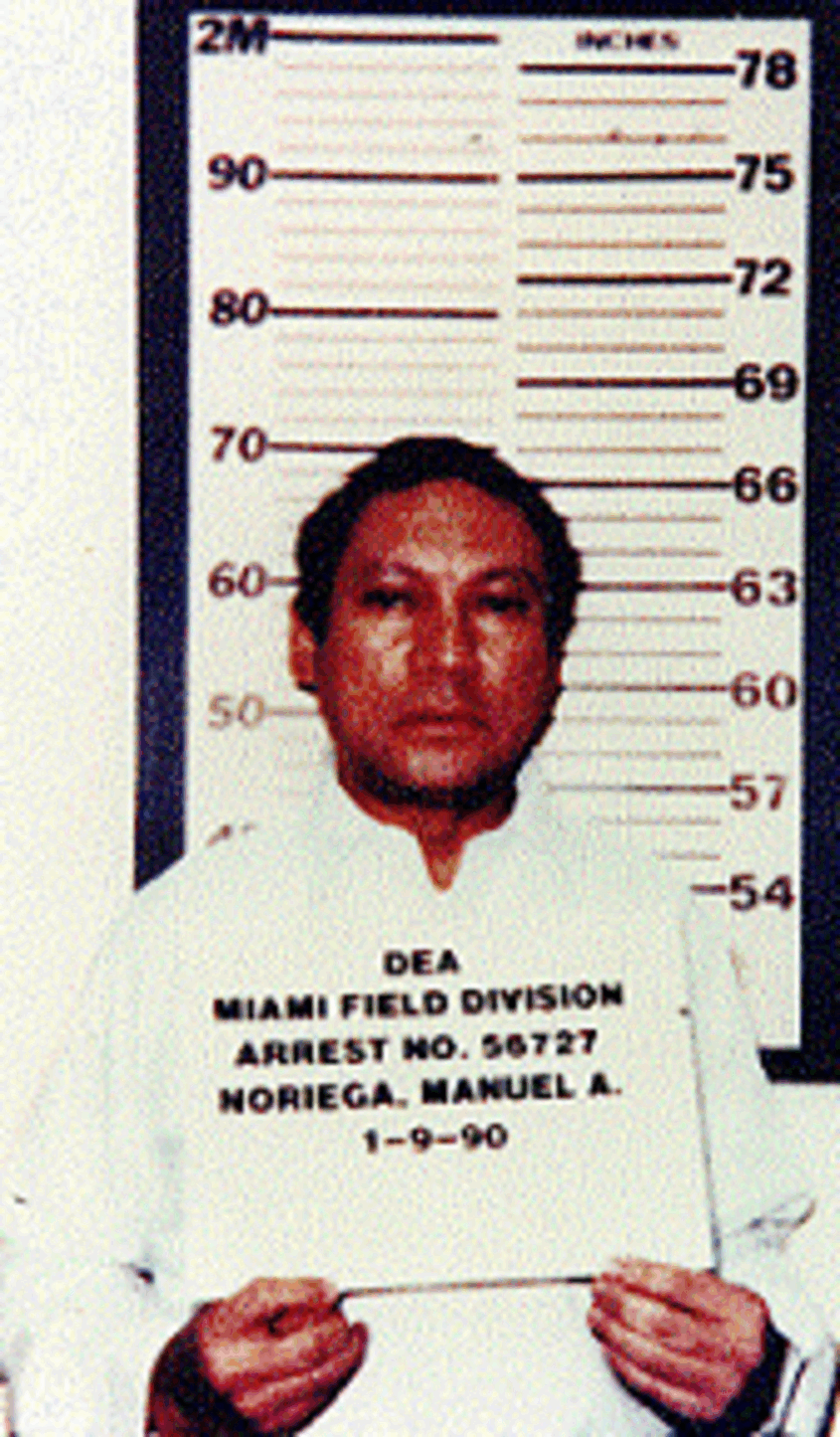 Manuel Noriega